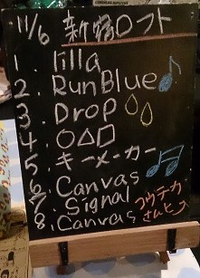 amiinaセトリボード(20151106(1))